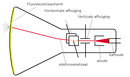 Kathodestraalbuis; bewerking van braunsche rohr van wiki-de